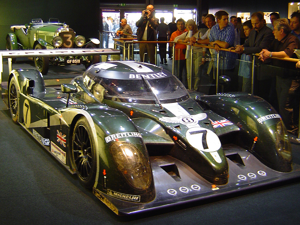 Der Bentley EXP Speed 8 auf der IAA in Frankfurt am Main